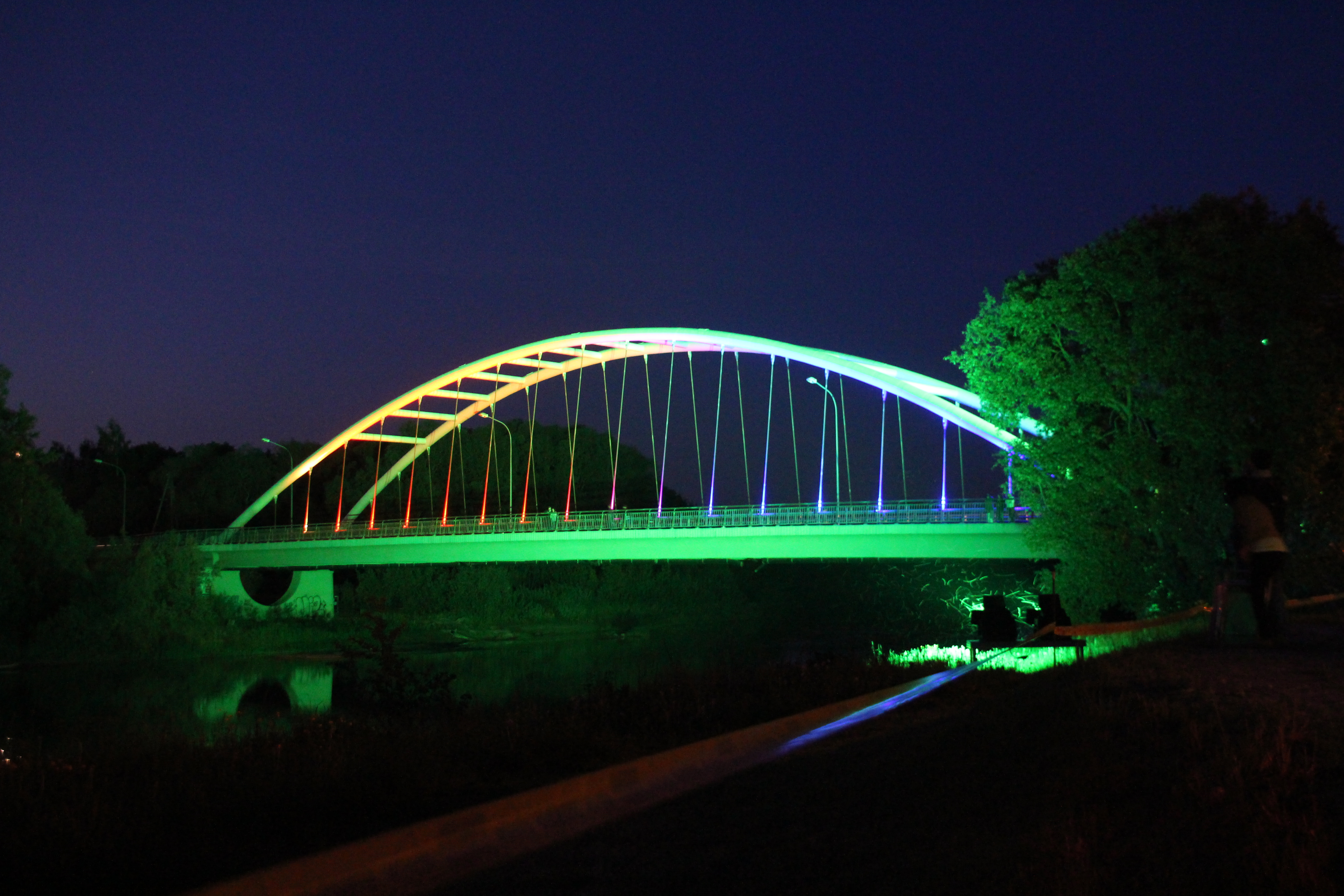 Tilts pār Gauju izgaismots Gaujas svētkos